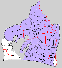 静岡県引佐郡の町村。